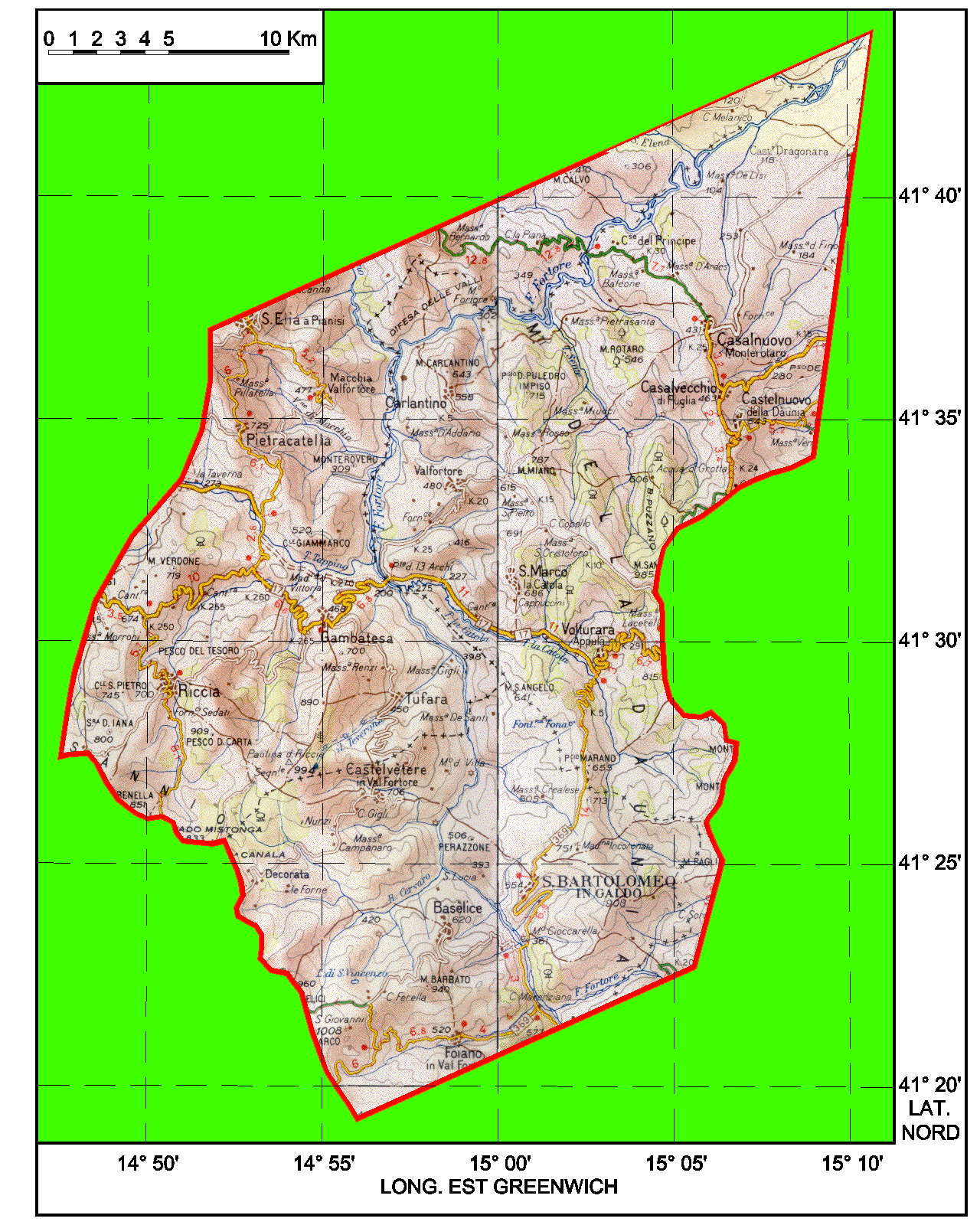 Il fiume Fortore della battaglia di Canne nella zona comune delle fonti antiche